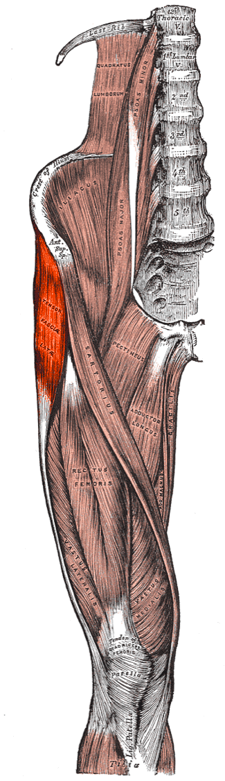 Tensor fasciae latae, colorized